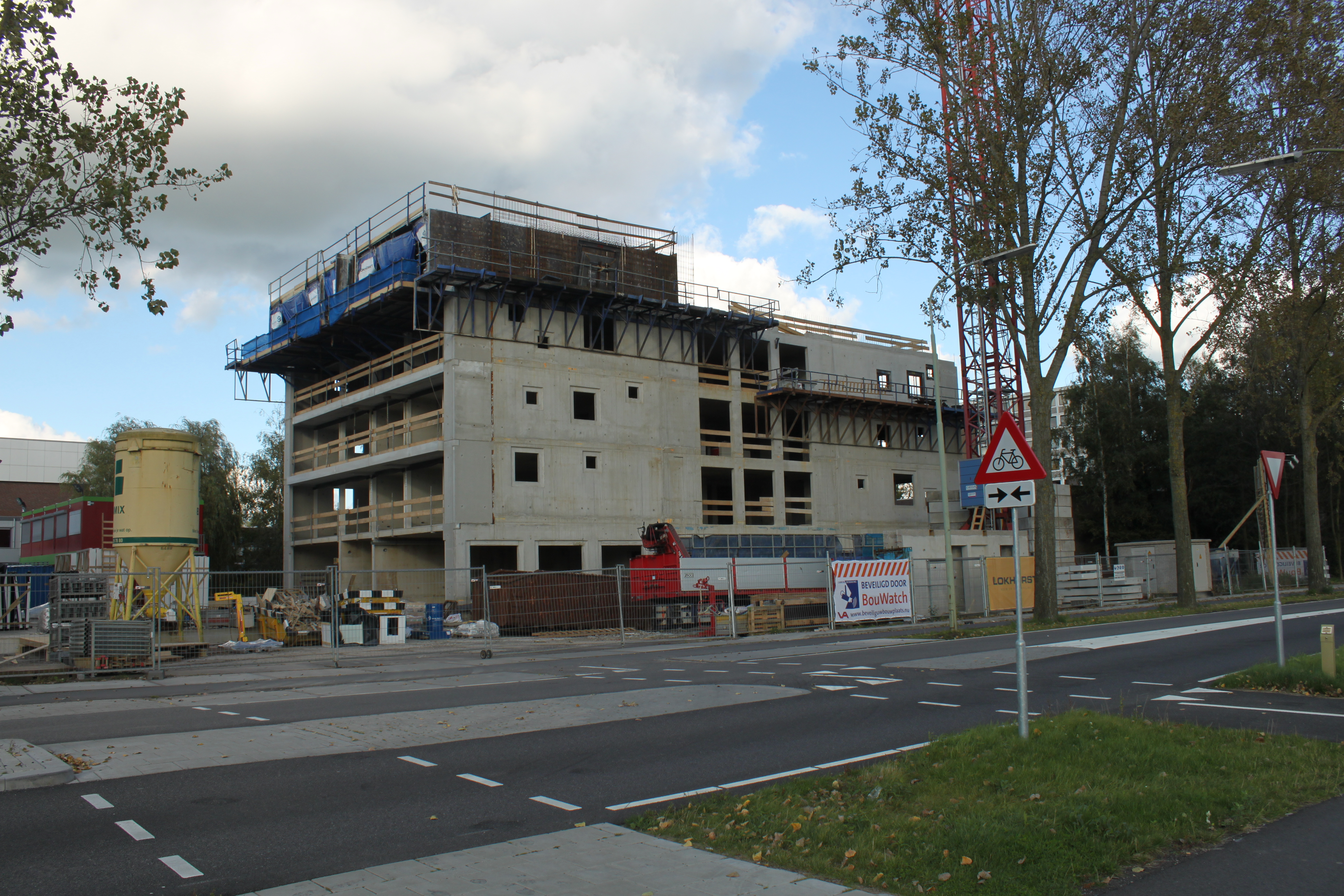 De woontoren voor Driestar Educatief in aanbouw (oktober 2012)